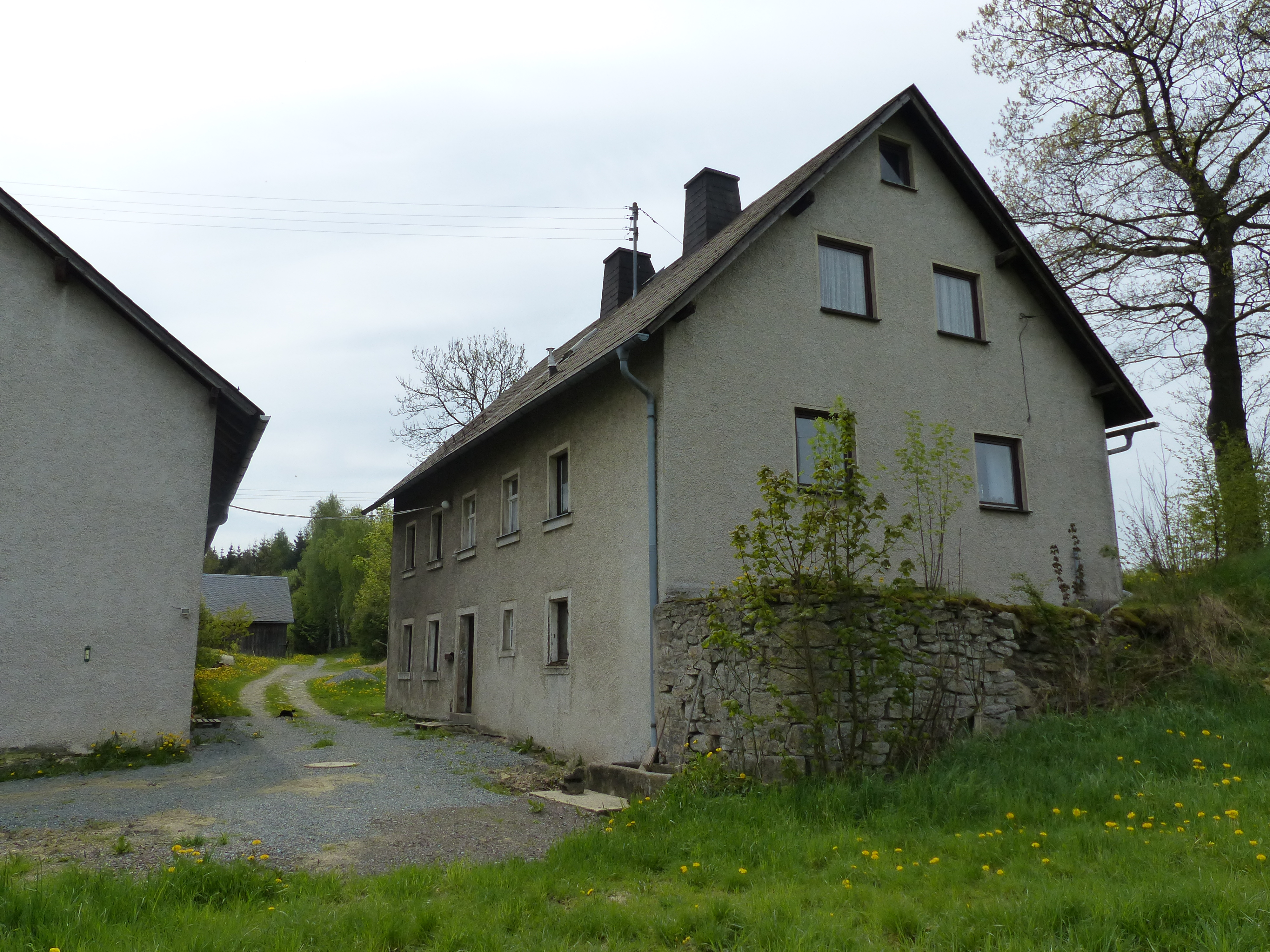 Ansicht der Lohmühle